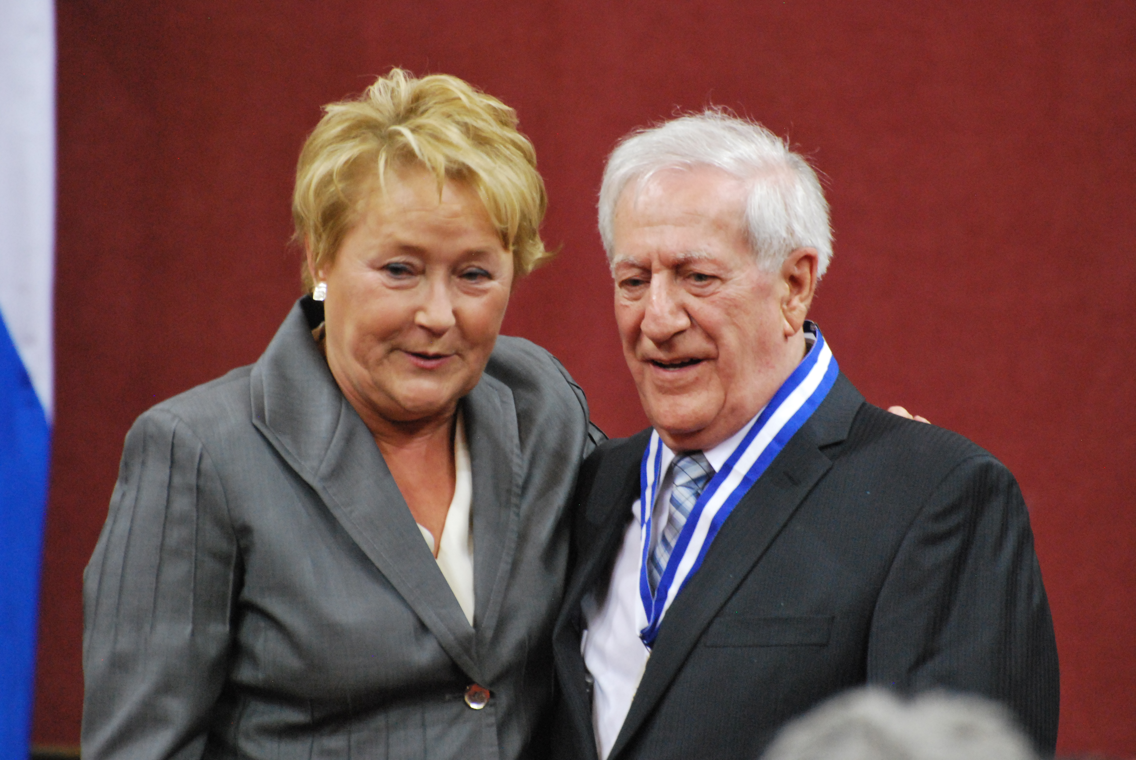 Cérémonie de remise de l'ordre national du Québec 2013. Marc-André Bédard.